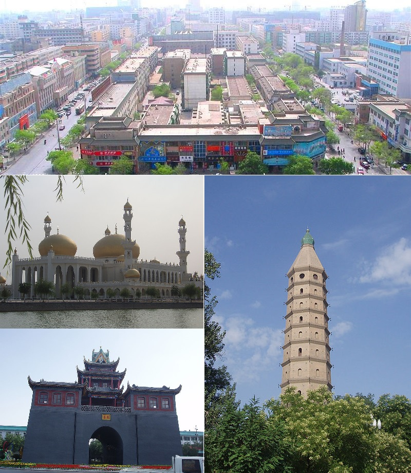 宁夏首府银川